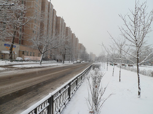 Зеленый проспект в Перовском районе Москвы.